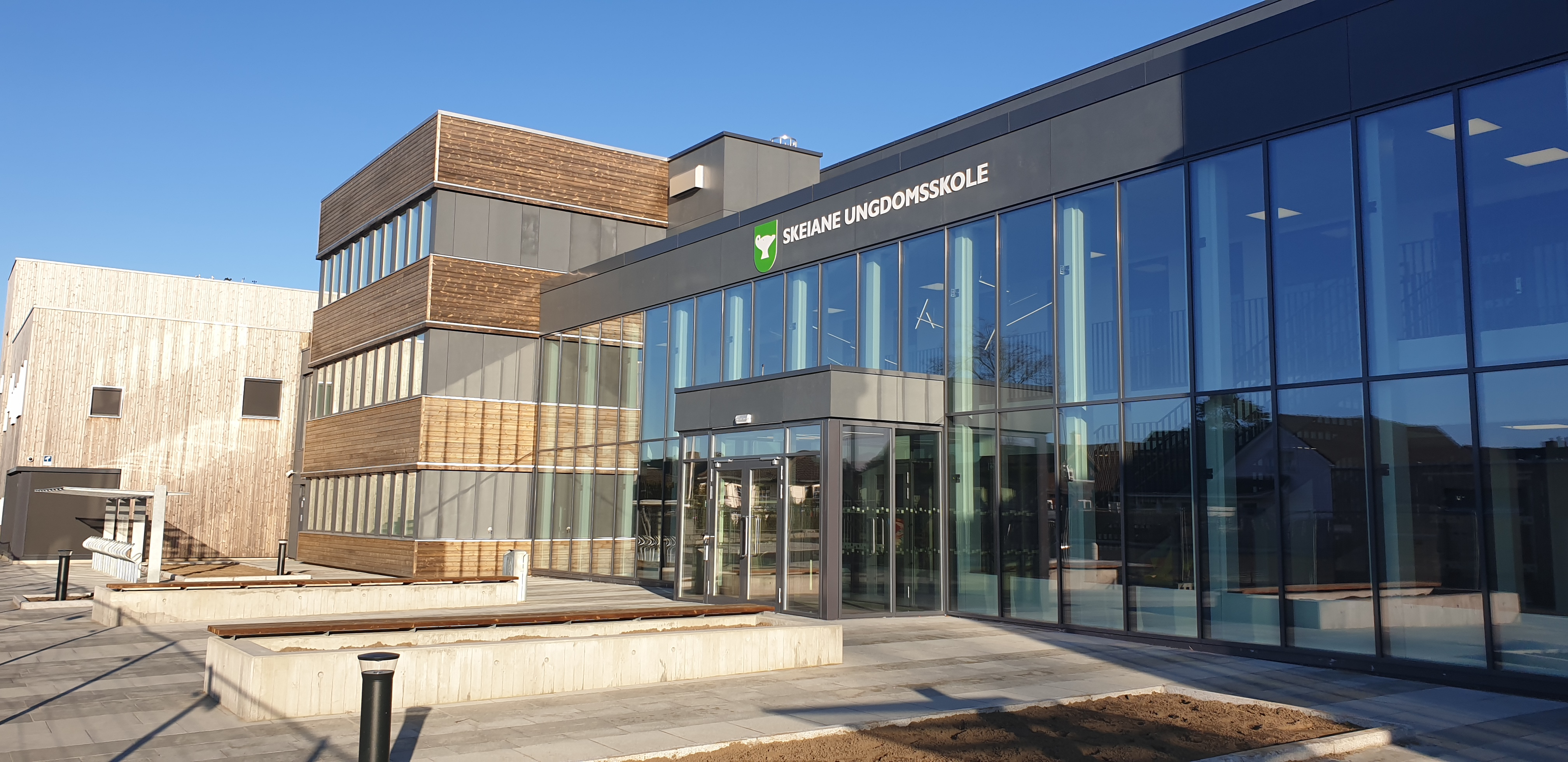 Oppdatert bilde av den nye forsiden av skolen